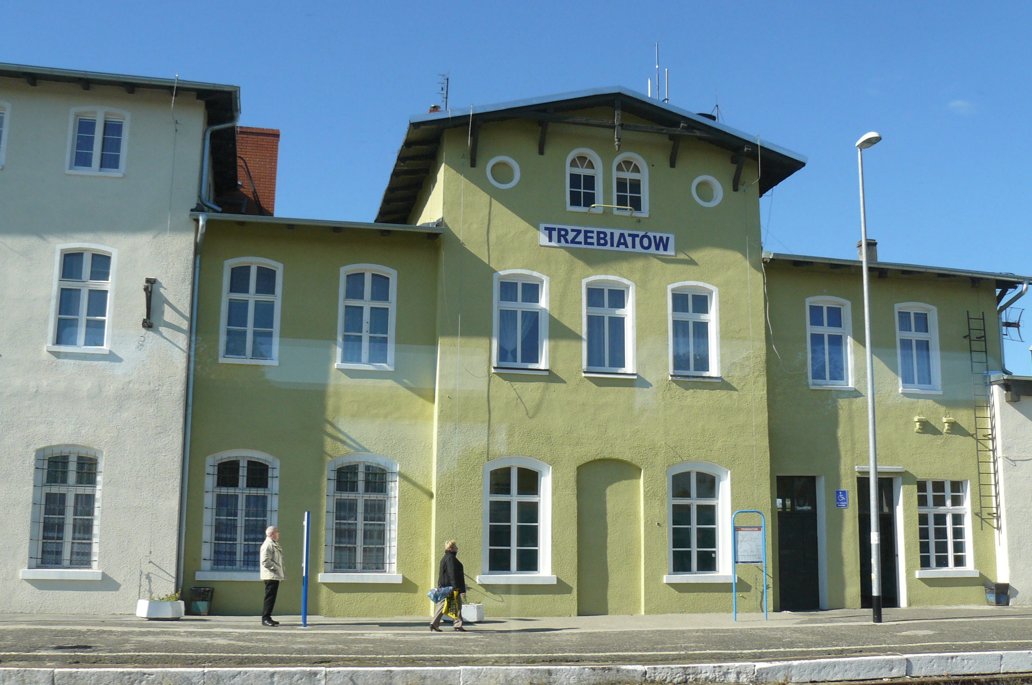 Trzebiatów - dworzec kolejowy.